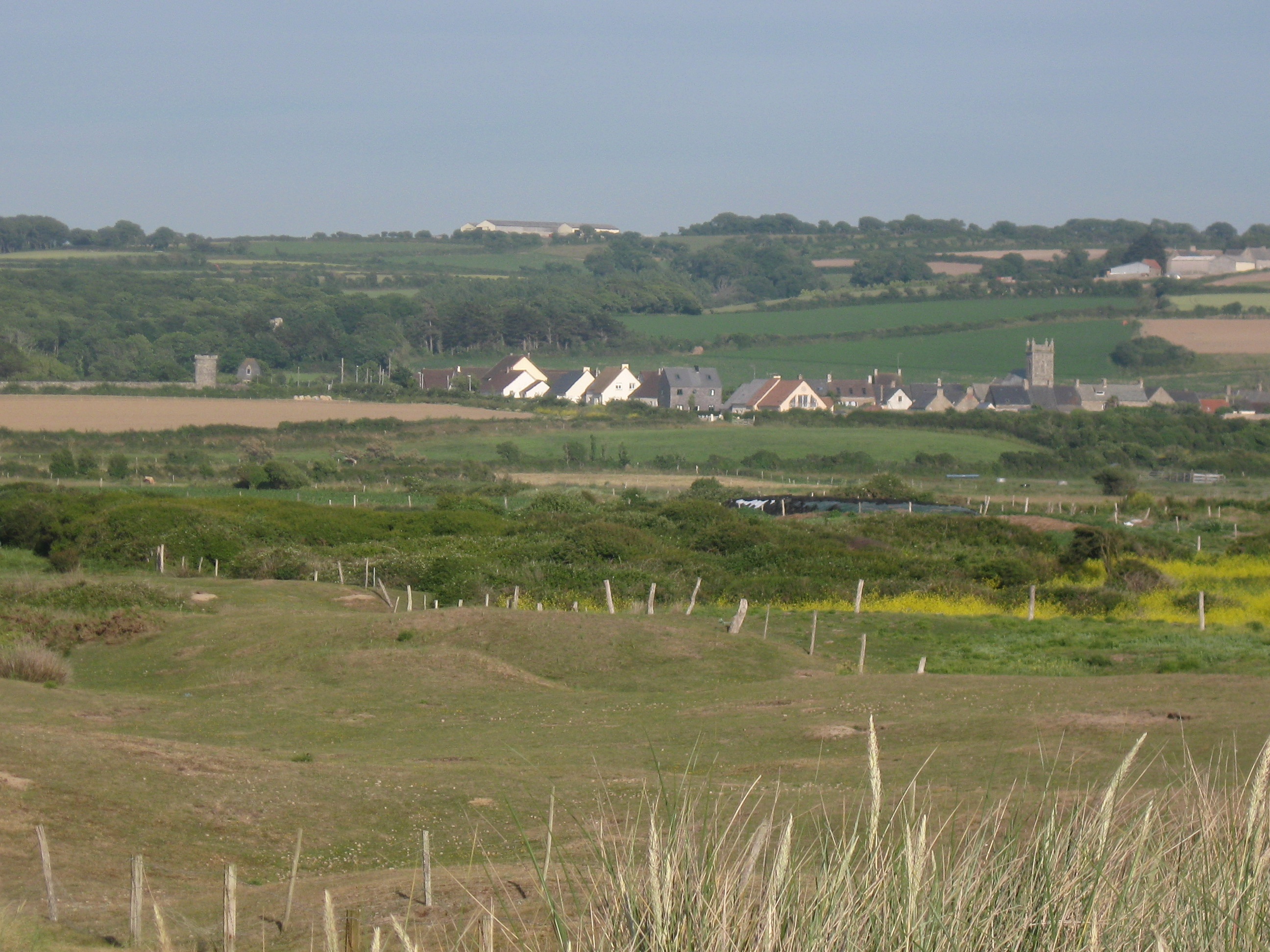 Le Rozel (Manche, Fr) vue du village